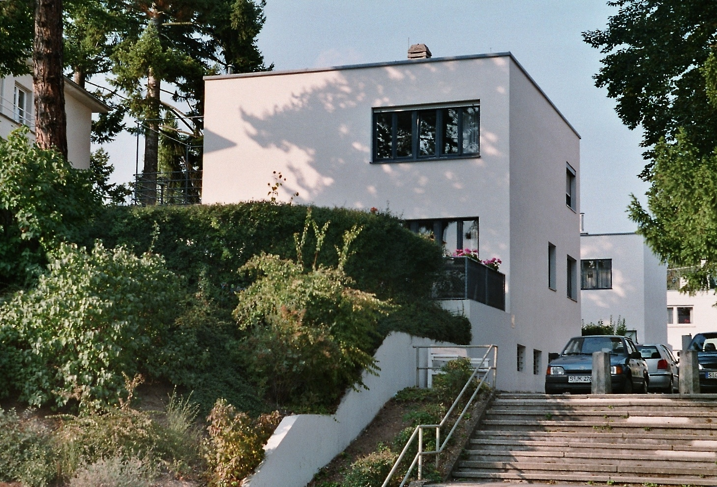 Stuttgart, Weissenhofsiedlung, house by Adolf Gustav Schneck. 1927, international style.